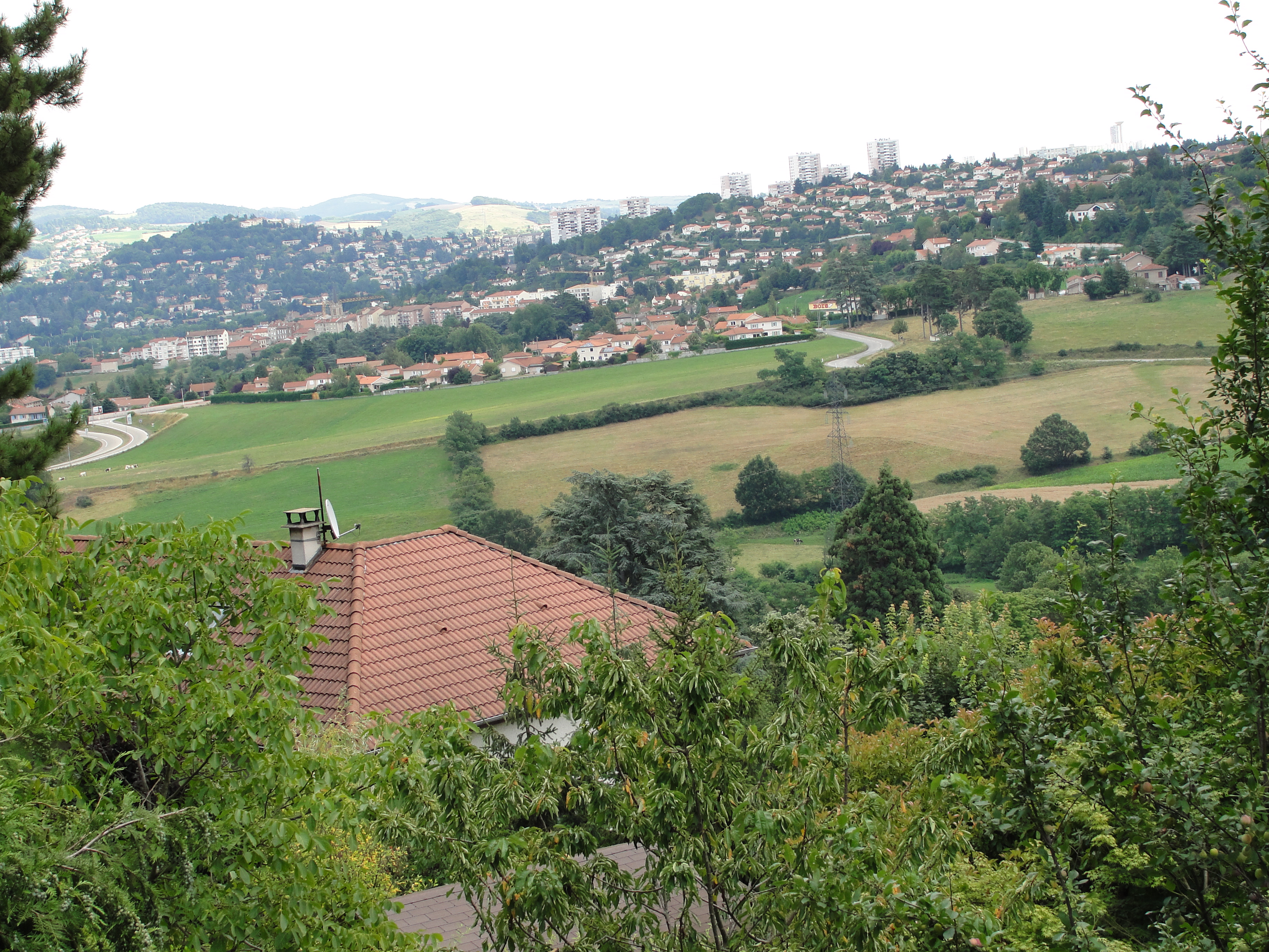 Villars (Loire) depuis le quartier du Chasseur, St-Genest Lerpt. Au fond, les tours de la Taillée, à gauche la butte de St-Priest, alors qu'on aperçoit un bout de la rocade ouest (D201).